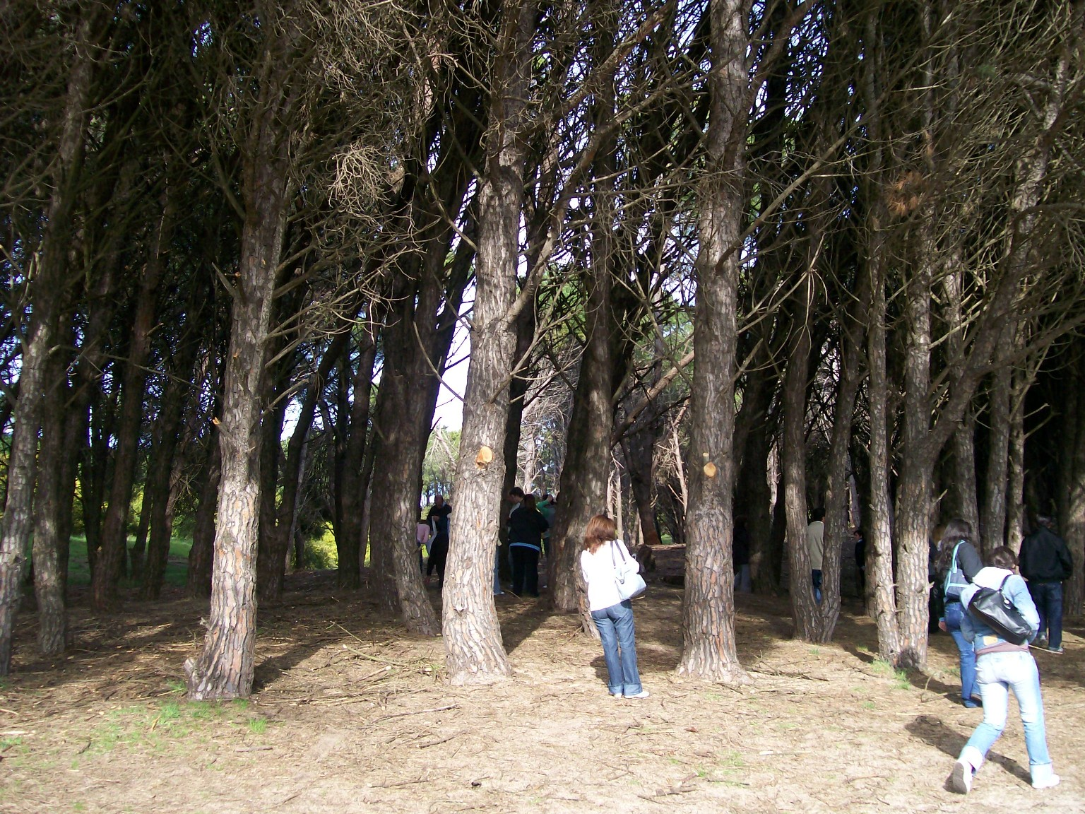 bosque energetico de miramar